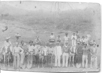 Foto da Abertura de estrada - BR 116 em 1939 cedida pela historiadora Zilma Sette